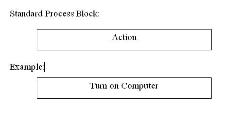 Nassi-Shneiderman diagram